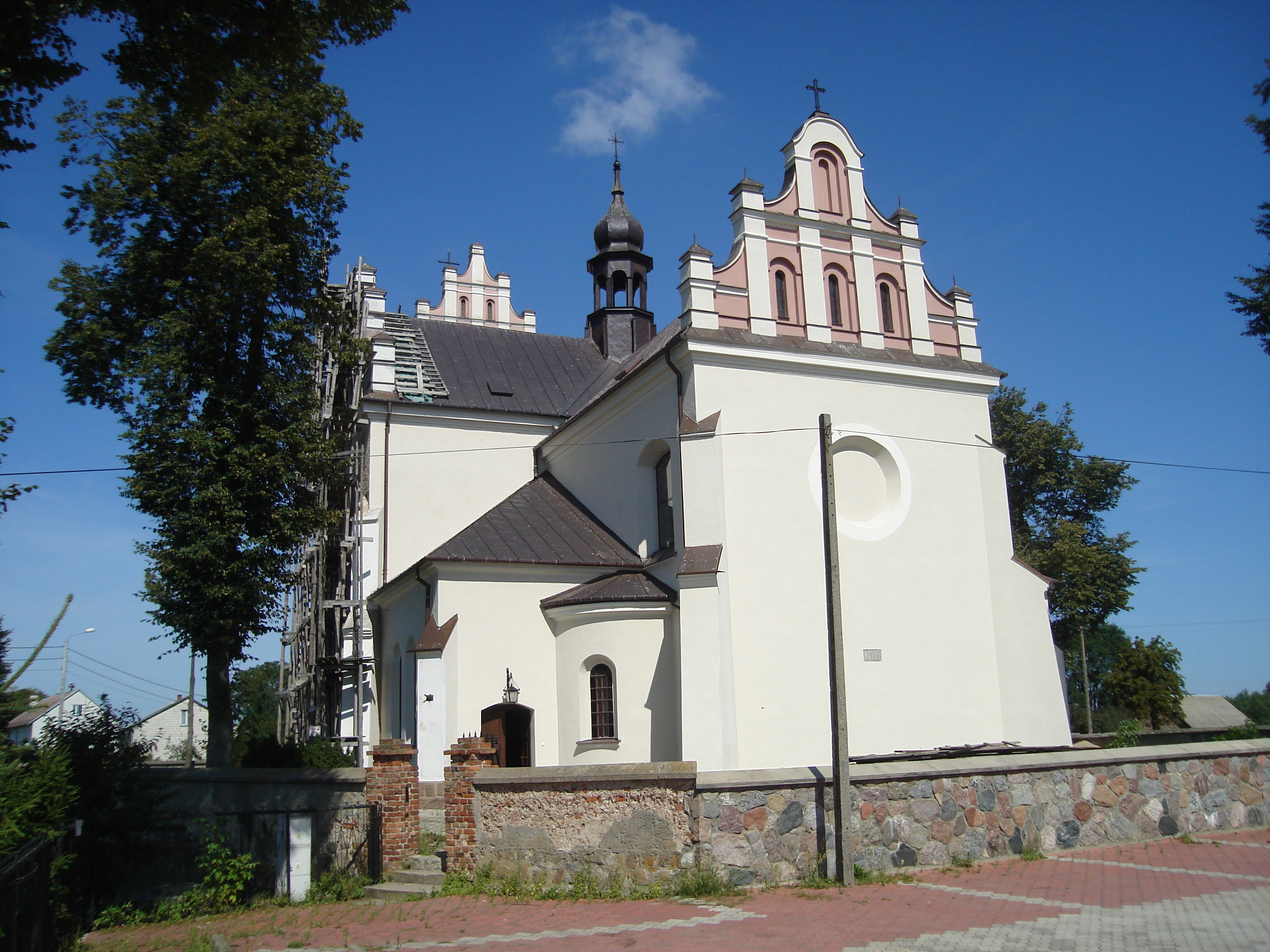 Kościół w Sieluniu. Widok z tyłu